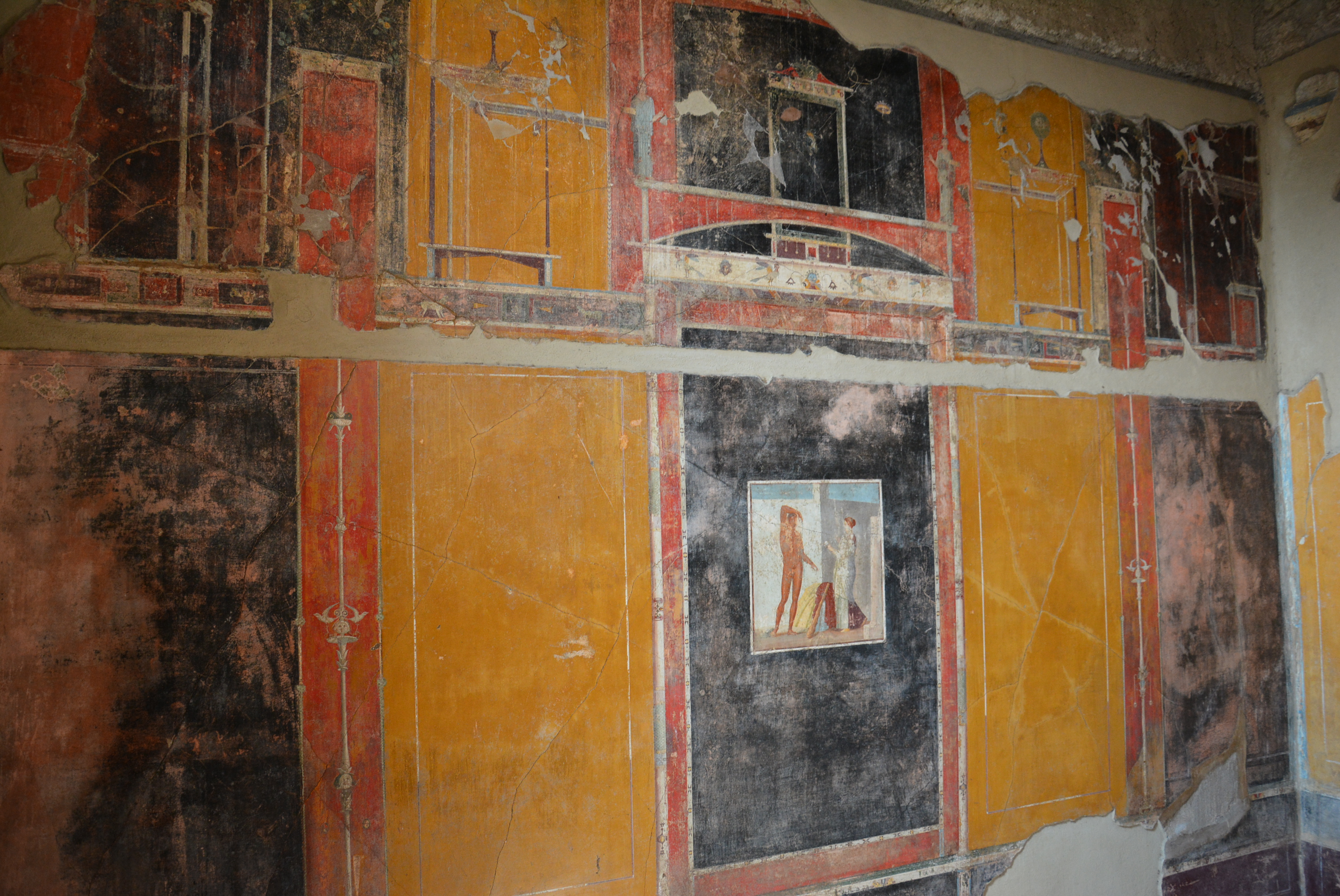 Casa di Marco Lucrezio Frontone - MIBACT This is a photo of a monument which is part of cultural heritage of Italy.